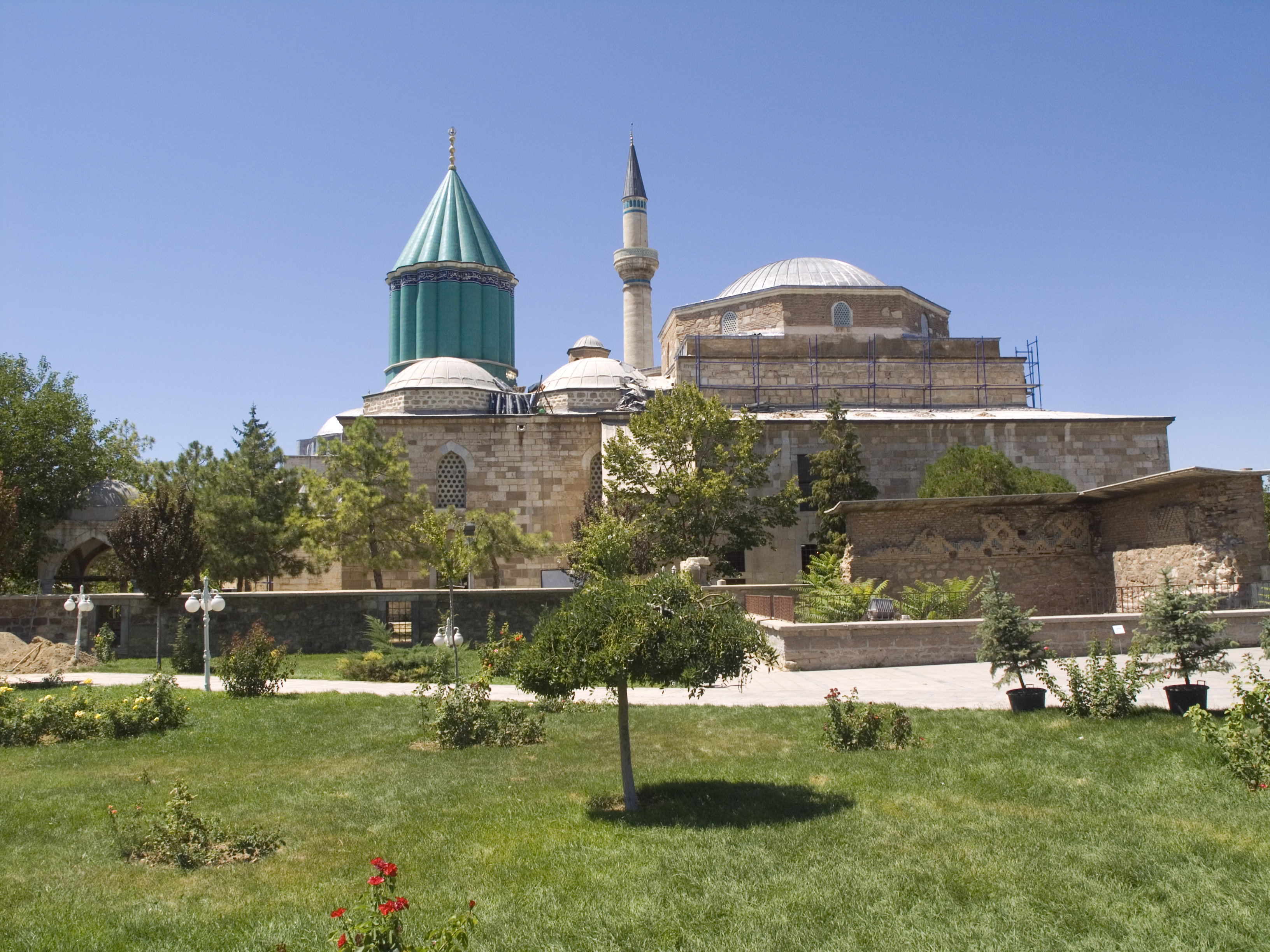 Турция, Конья – Музей Мевляны